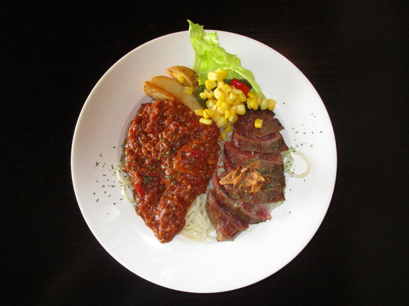 淡路島ぬーどる（兵庫県洲本市、秘密基地akariより撮影）